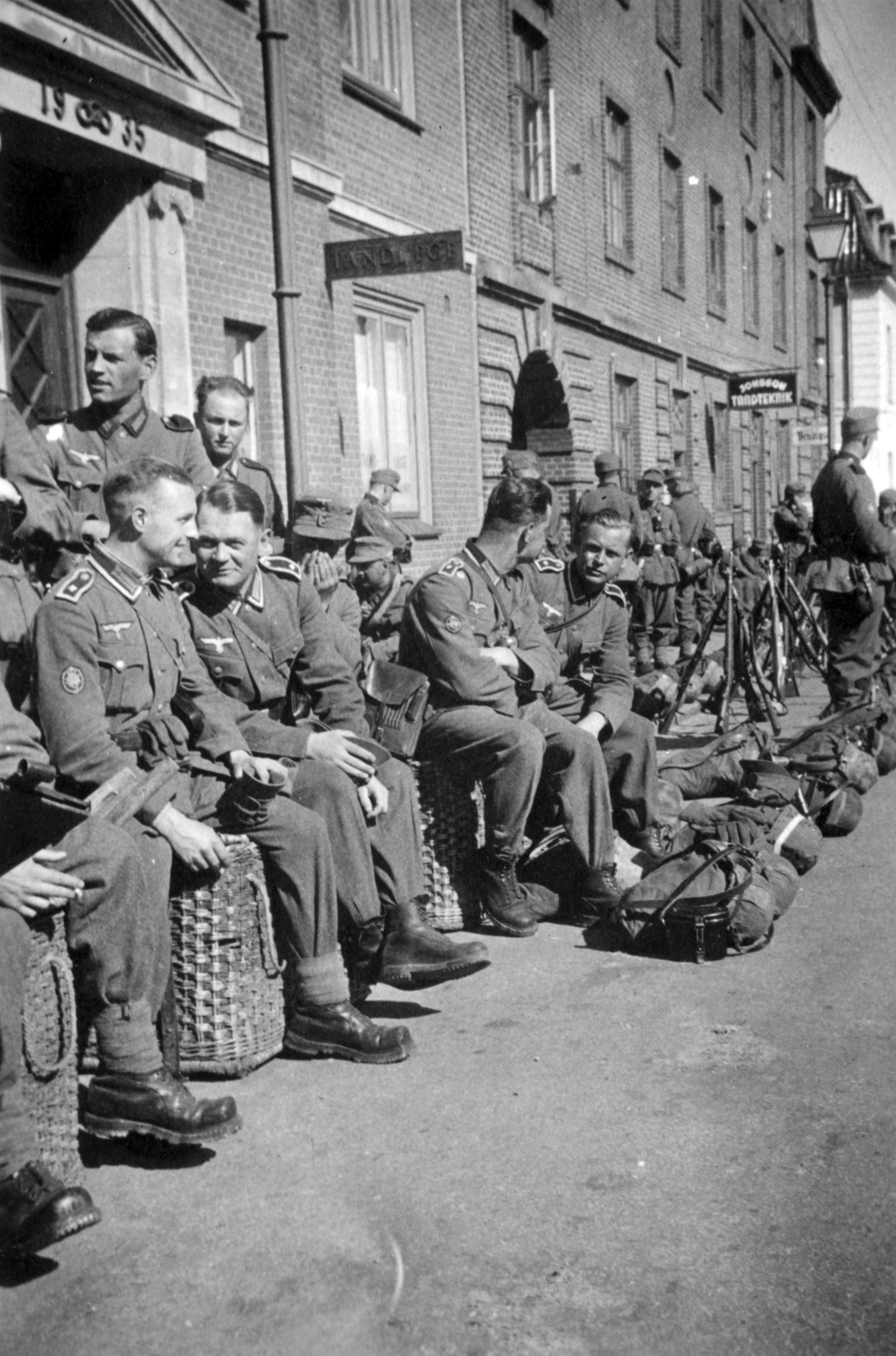 Fredrikshavn,Danmark, før transporten til Norge Tittel / Title: Danmark, før transporten til Norge Dato / Date: Ukjent/Uknown Fotograf / Photographer: Karl Marth Sted / Place: Ukjent/Uknown Eier / Owner Institution: Arkiv i Nordland Lenke / Link: Arkiv i Nordland Arkivreferanse /Archive reference: AIN.NA143.0214 Fra Dag Skogheims Privatarkiv